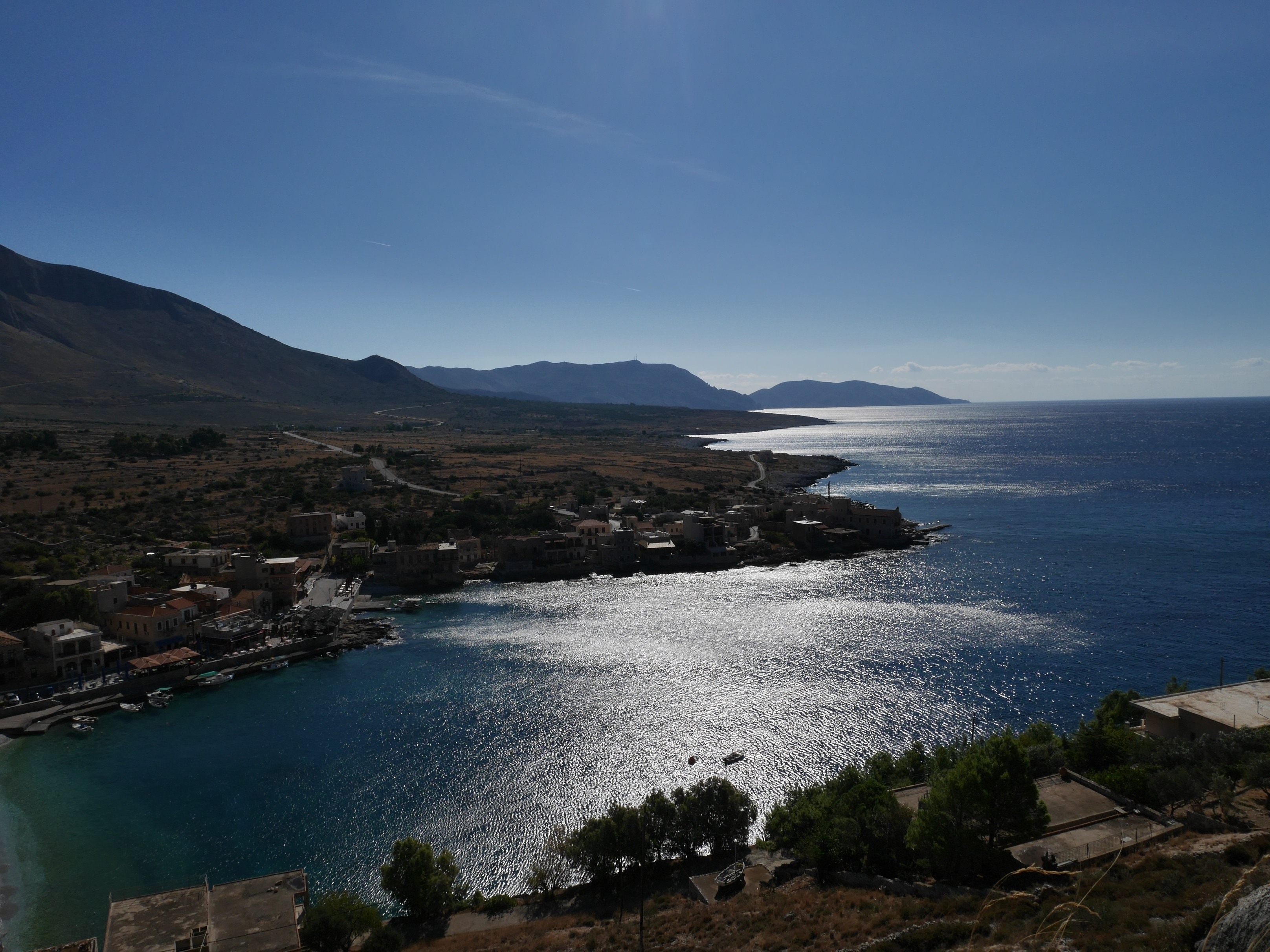 Vue du village et de la côte. A l'horizon le cap Matapan